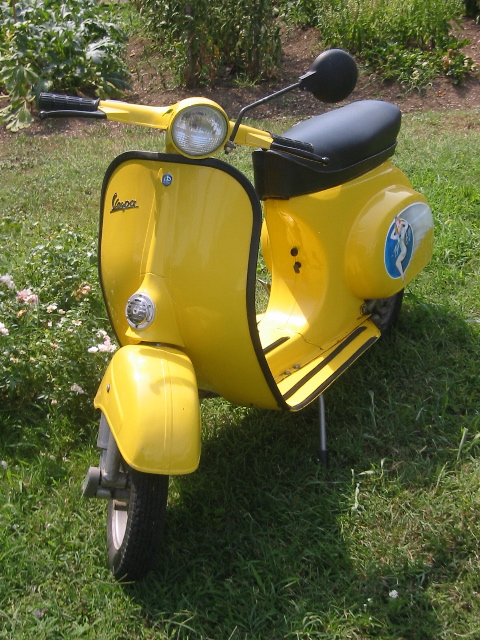 Vespa